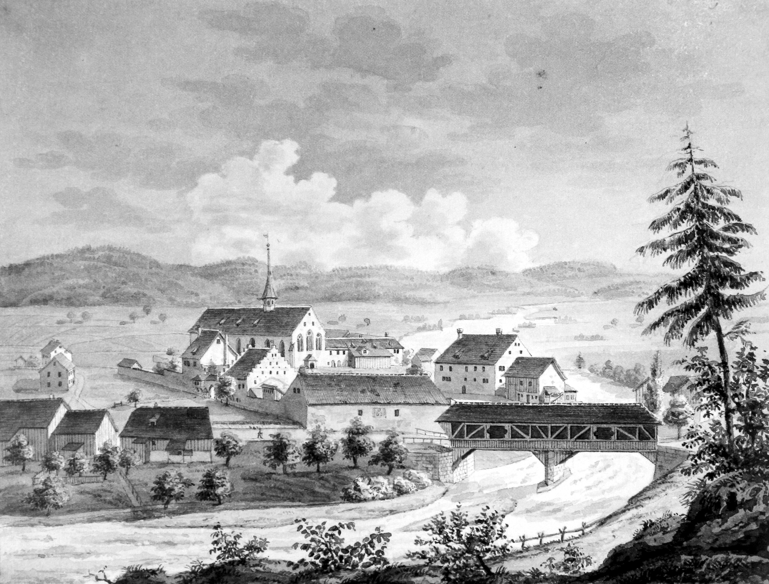 Kloster Töss Ansicht von Norden um 1838, Zeichnung von Ludwig Schulthess